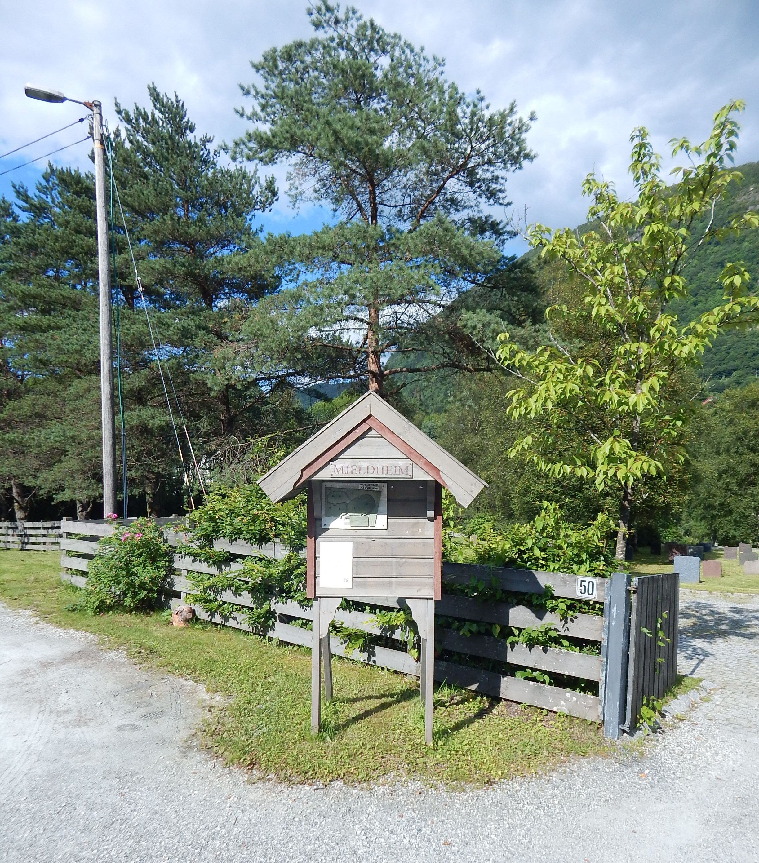 Mjeldheim gravplass, Indre Arna, Bergen kommune